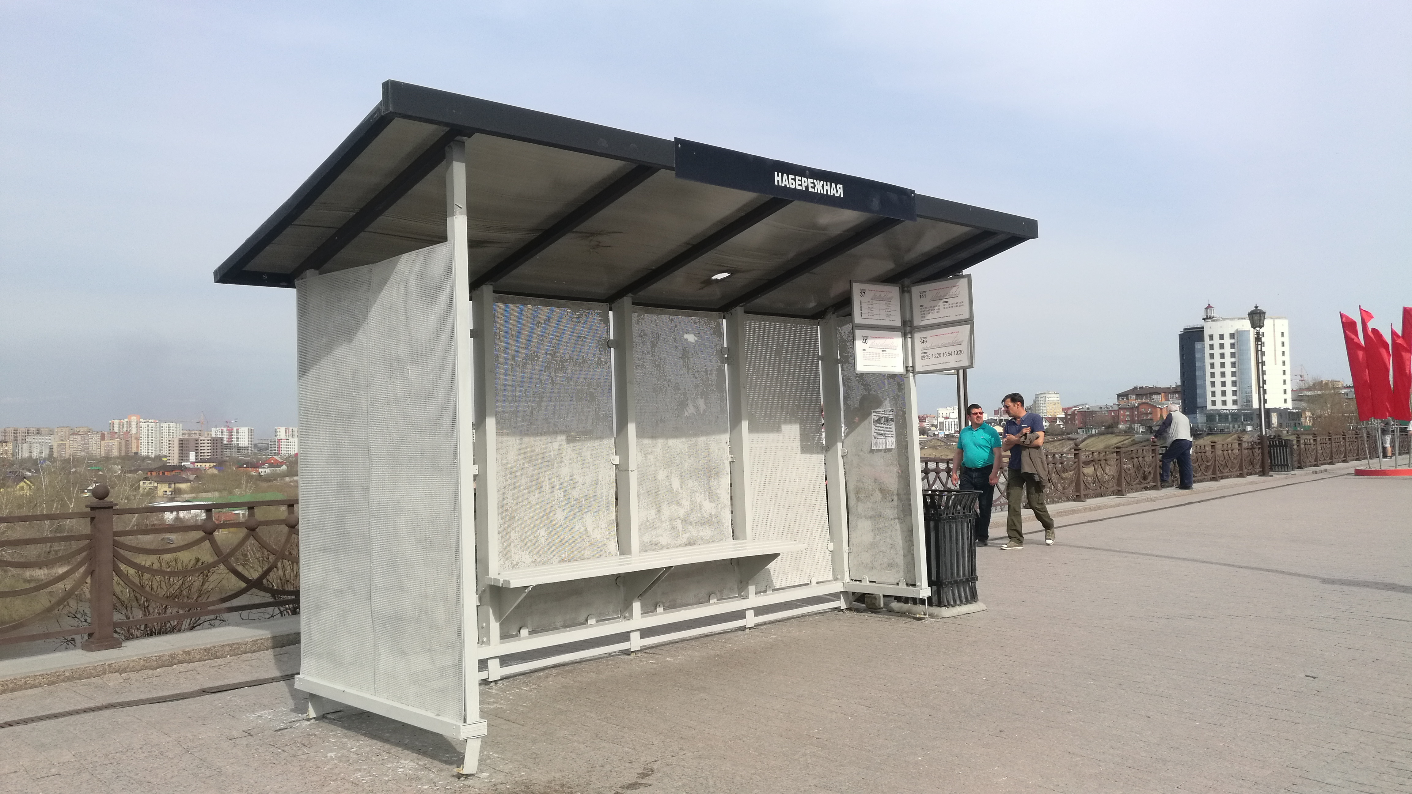 Haltejo Kajo. Tjumeno, Rusio.